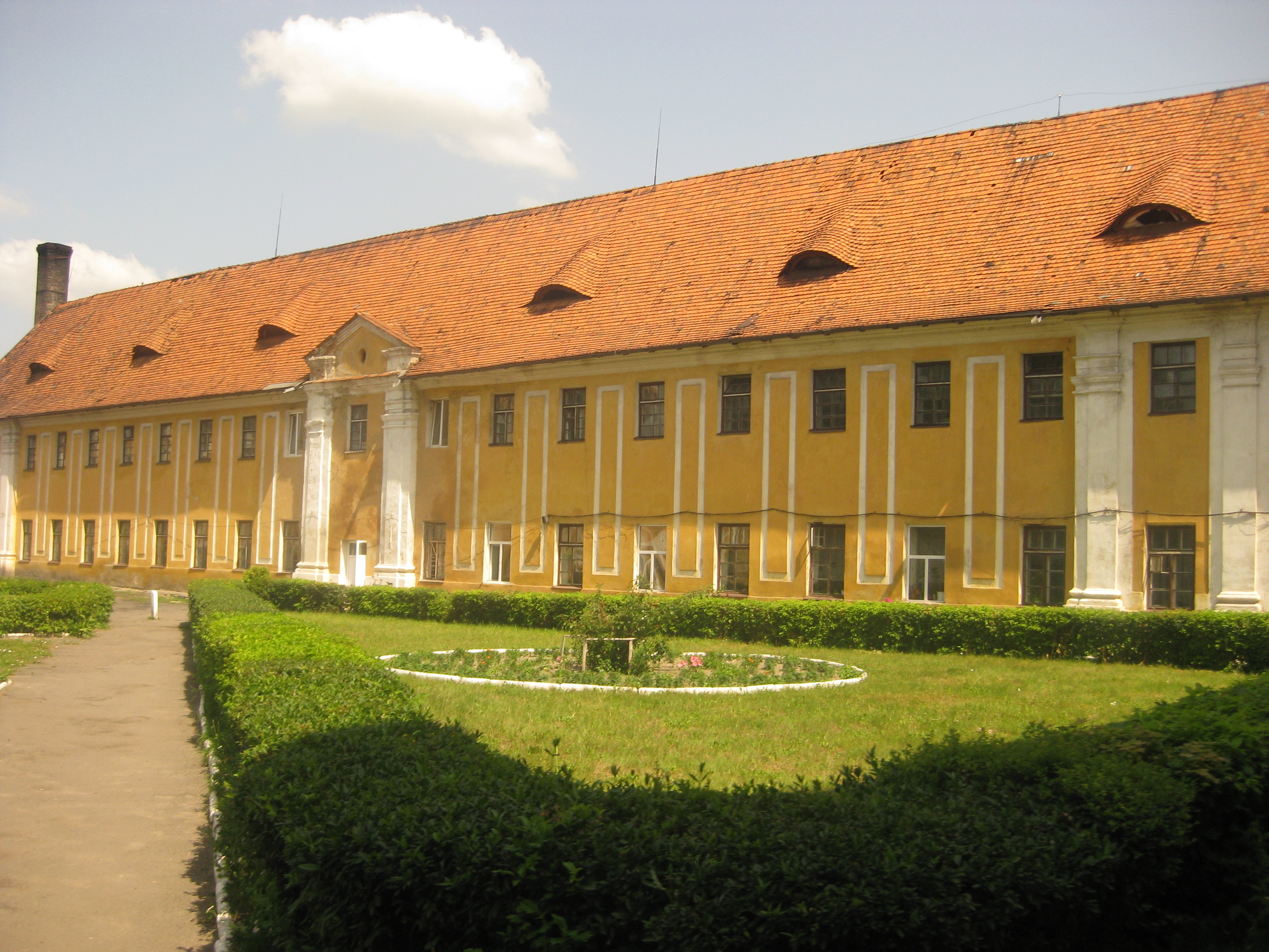 Замок Радзивіла (мур.), Олика